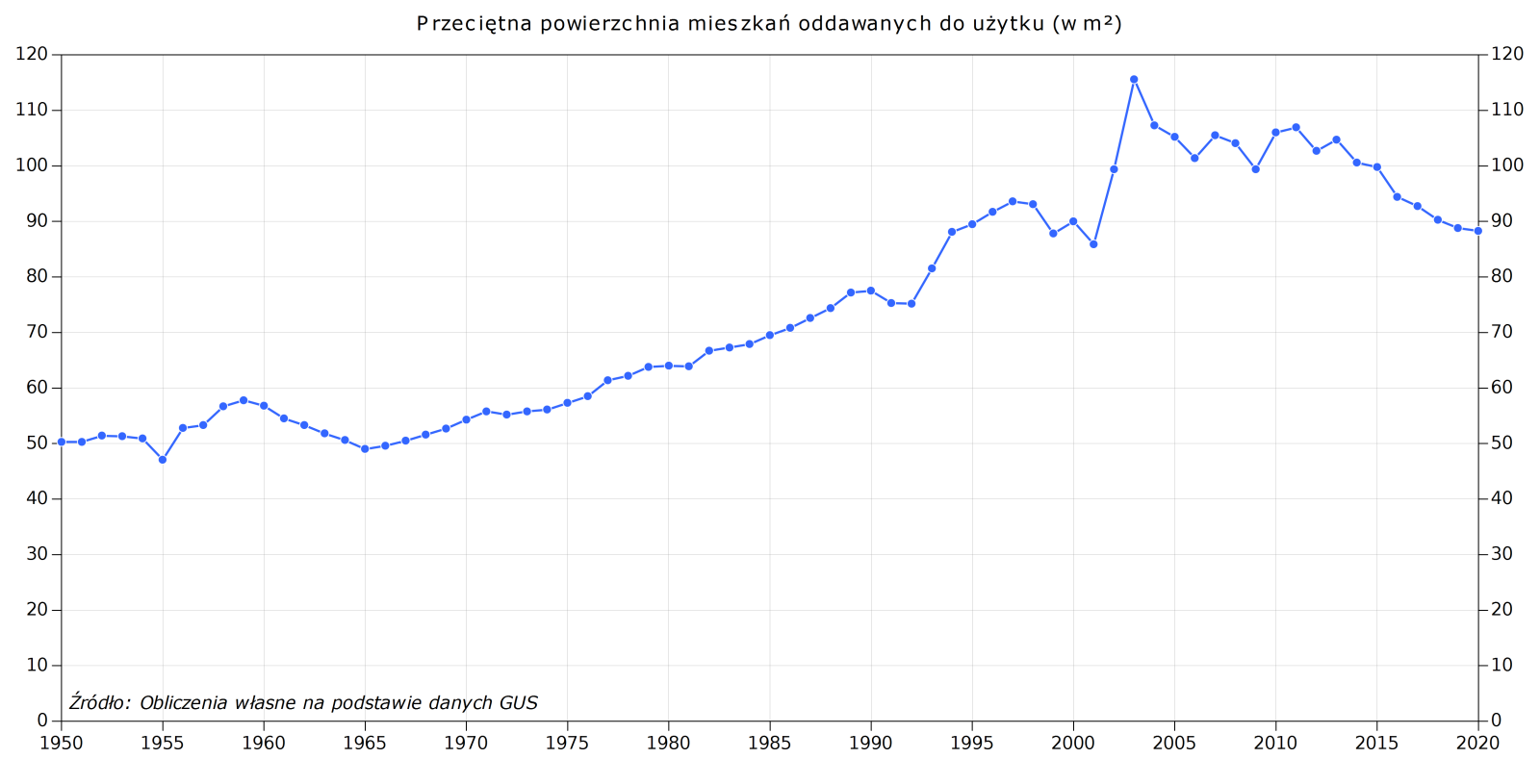 Przeciętna powierzchnia mieszkań oddanych do użytku od 1950 roku. Źródło: Obliczenia własne na podstawie danych GUS